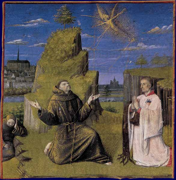 Heures à l'usage d'Angers; Paris, BnF, département des Manuscrits, NAL 3211, fol. 241